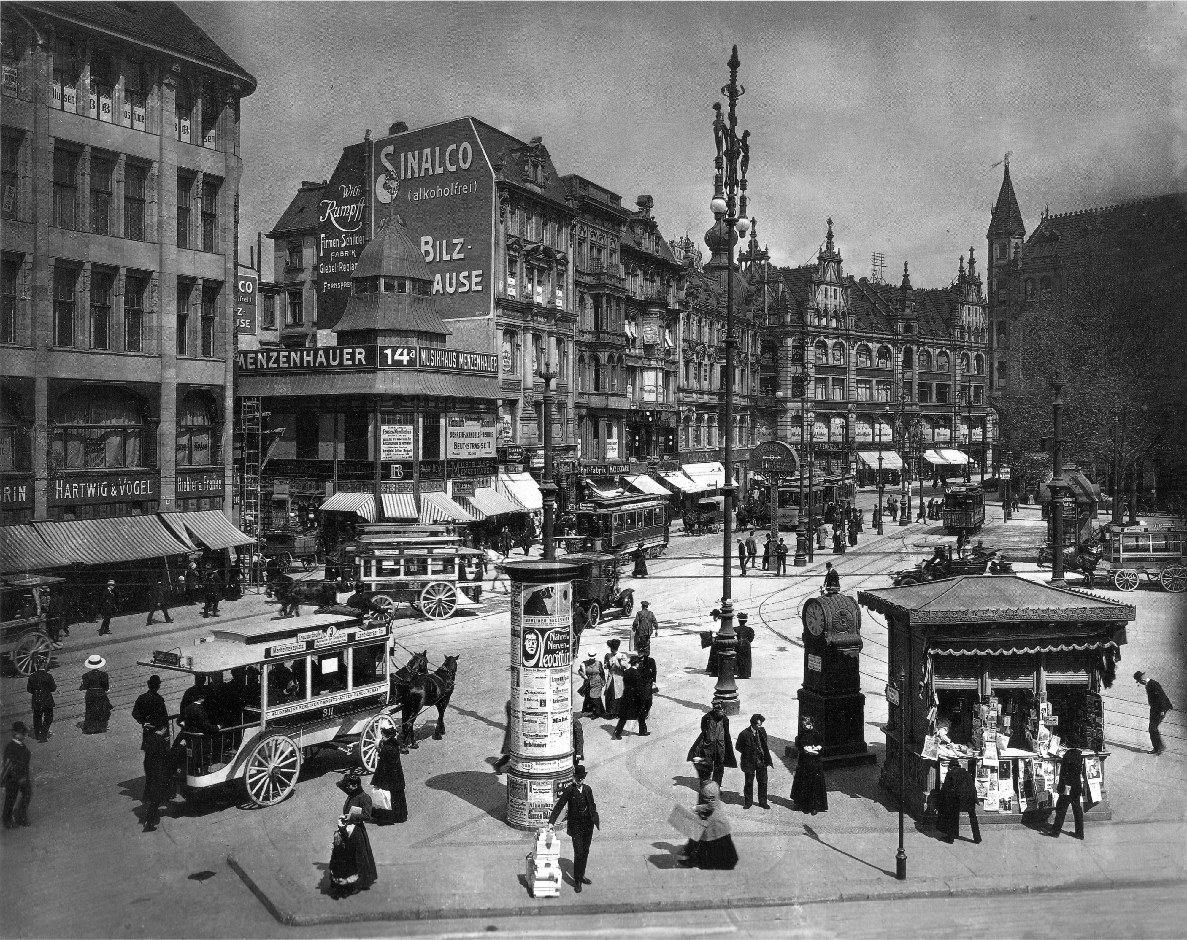 Berlin. Spittelmarkt I. Am Spittelmarkt Nr. 15 Hartwig & Vogel (Laden) Richter & Franke Cigarren (Laden) Arnold Ascher Herren Moden (1. Etage) ...(?) & Co...(?) (4. Etage) ...? EB Blusen Kostüme (4. Etage) II. Am Spittelmarkt Nr. 14 a ...(?)ner Cravatten-Industrie (Laden) BR Bazar Royal ...(?) (Laden) Musikhaus Menzenhauer (Laden) Sämtliche sichtbaren(?) Fenster u. Wandflächen dieser 1. Etage sowie der Turm sind für Reklamezwecke zu vermieten. ...(?) Architekt Arthur Sedall 5...(?) Gutscheiderstr. 107 (Plakat 1. Etage) H. Strahlendorffs(?) Schreib- & Handels-Schule, Beuthstrasse 11, ...(?) (Plakat 1. Etage) Wilh. Rumpff Firmenschilder-Fabrik Giebel Reclame (Giebelwerbung) Sinalco (alkoholfrei) Bilz Brause (Giebelwerbung, gez. Rumpff, s. o.) III. Cigarren Schwarzenleger/Schwarzenberger(?) Muratti (Laden) ...(?) (Laden ...(?)mal Restaurant Café (Laden) Pelz Confection Kürschne(??)r. Feiler (1. und 2. Etage) IV. Hut-Fabrik Max Eckard (Laden) 2 Läden ? (1. Etage) Ocular...(?) ...(?) Augengläser (1. Etage) ...(?) Moritz Peil (2. Etage) Carla Cohn(?) V. Eckhaus links vorn C.H. Mewis VI. (Spittelmarkt 8/10 "Hansa-Haus") A. Zuntz sel. Ww. (Kaffee-Laden) M. Aacher Blusen Backfisch-Kleider Morgenröcke (1. Etage) Engel & Co Pelzwaren (3. Etage)